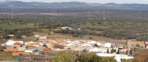 Navacerrada, Ciudad Real.